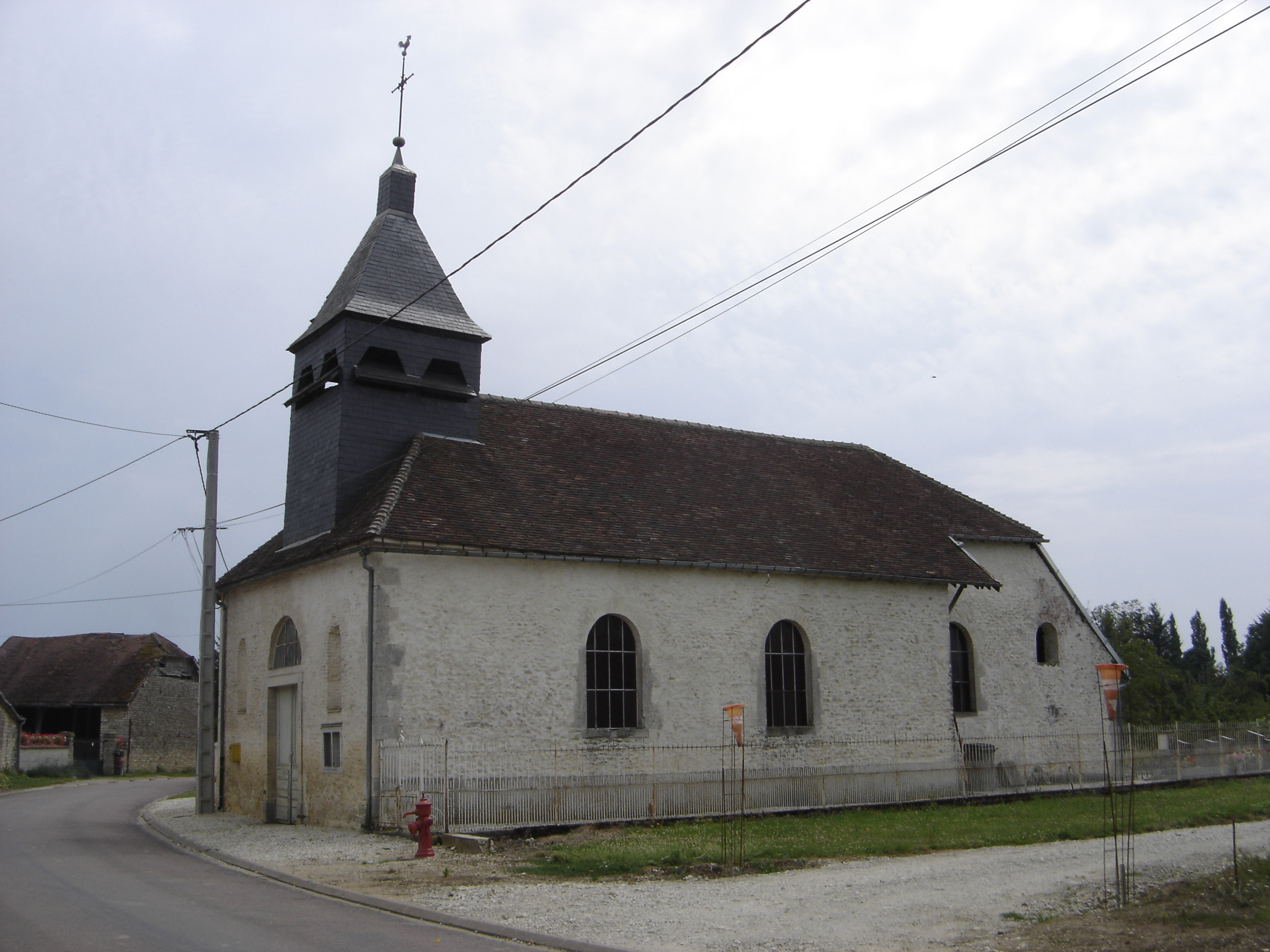 église de Maison-des-Champs - Aube - France